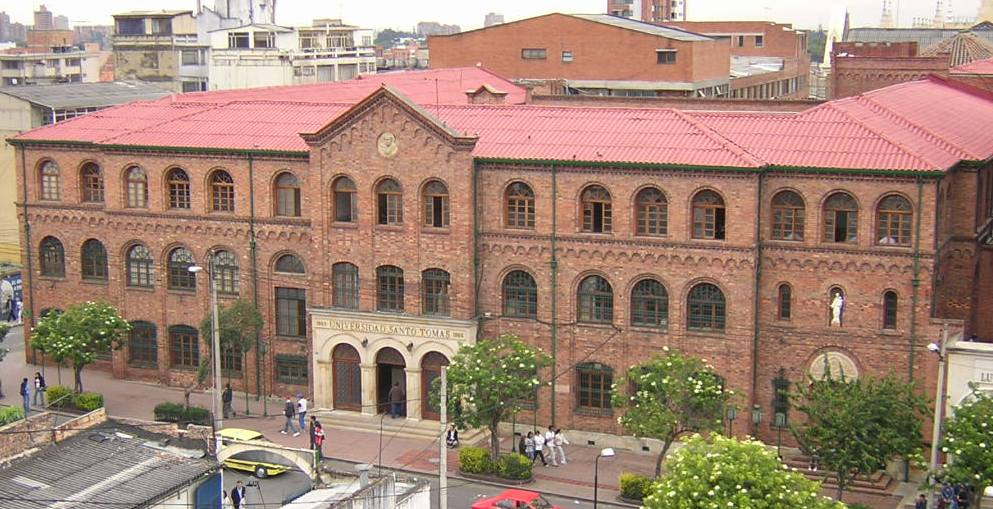 Universidad Santo Tomás sede ubicada centro de Bogotá, Colombia. Dirección Carrera 9 Nº 51-11 (esta foto la tome yo, y la libero al dominio público) Category